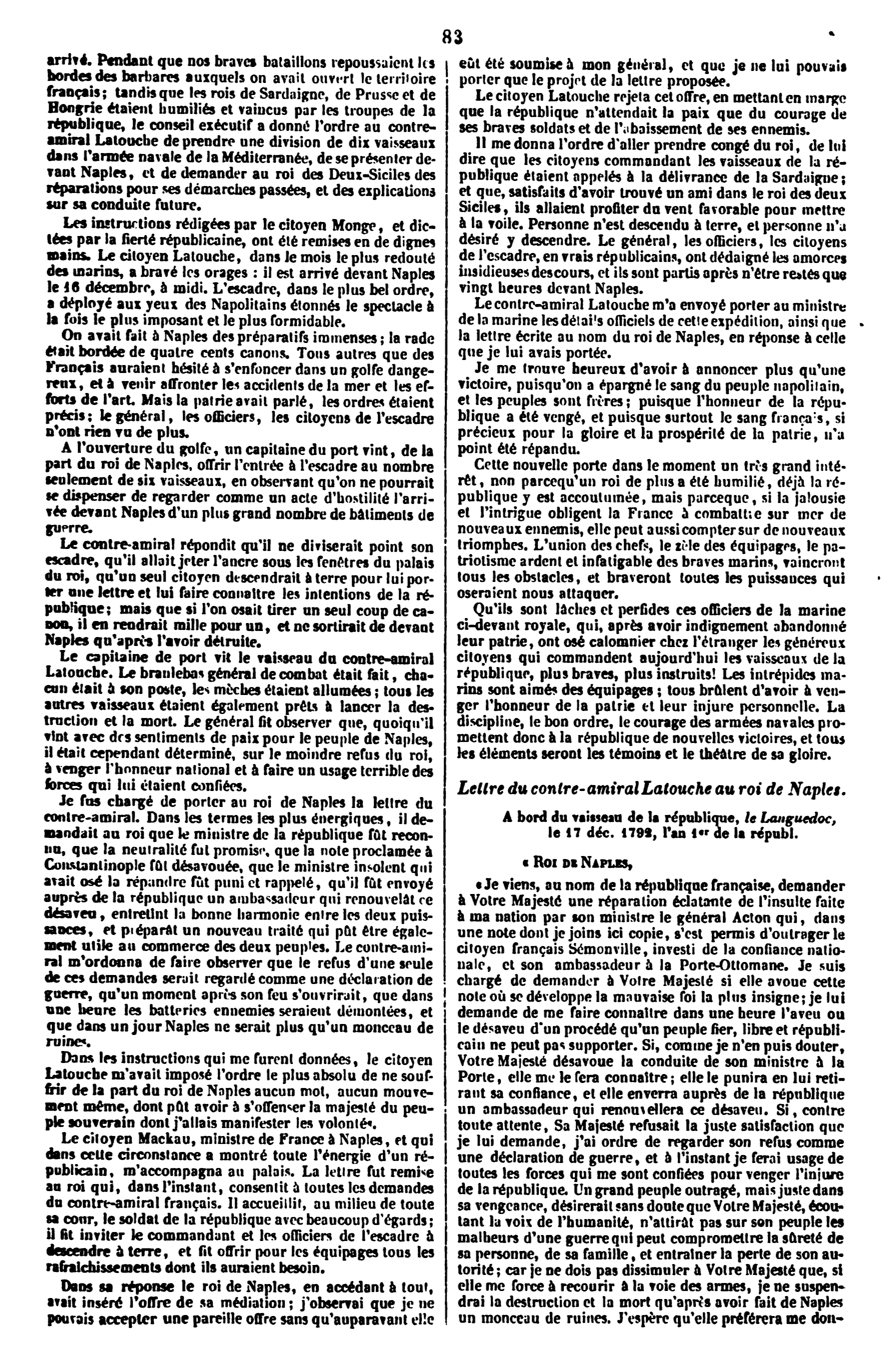 Article on Louis-René Levassor de Latouche Tréville